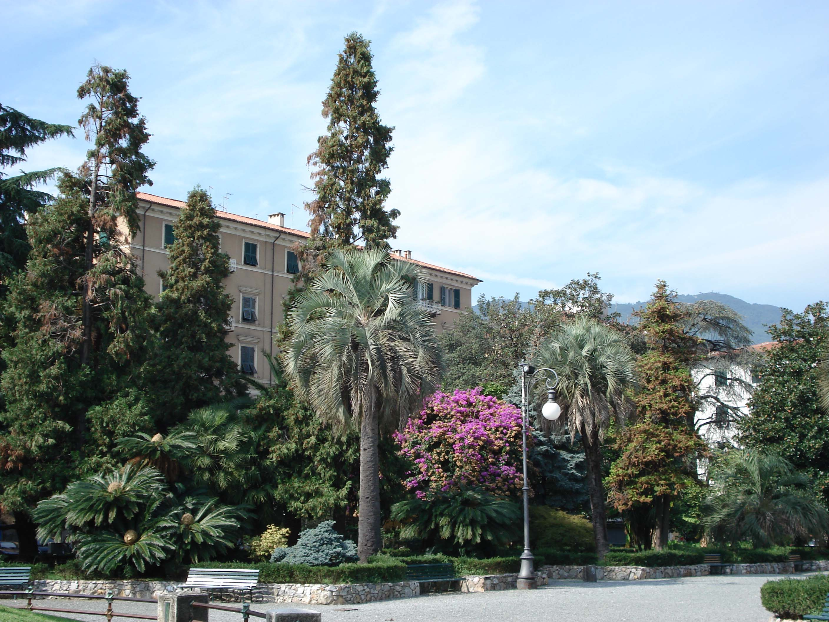 Giardini pubblici - La Spezia - Italia.